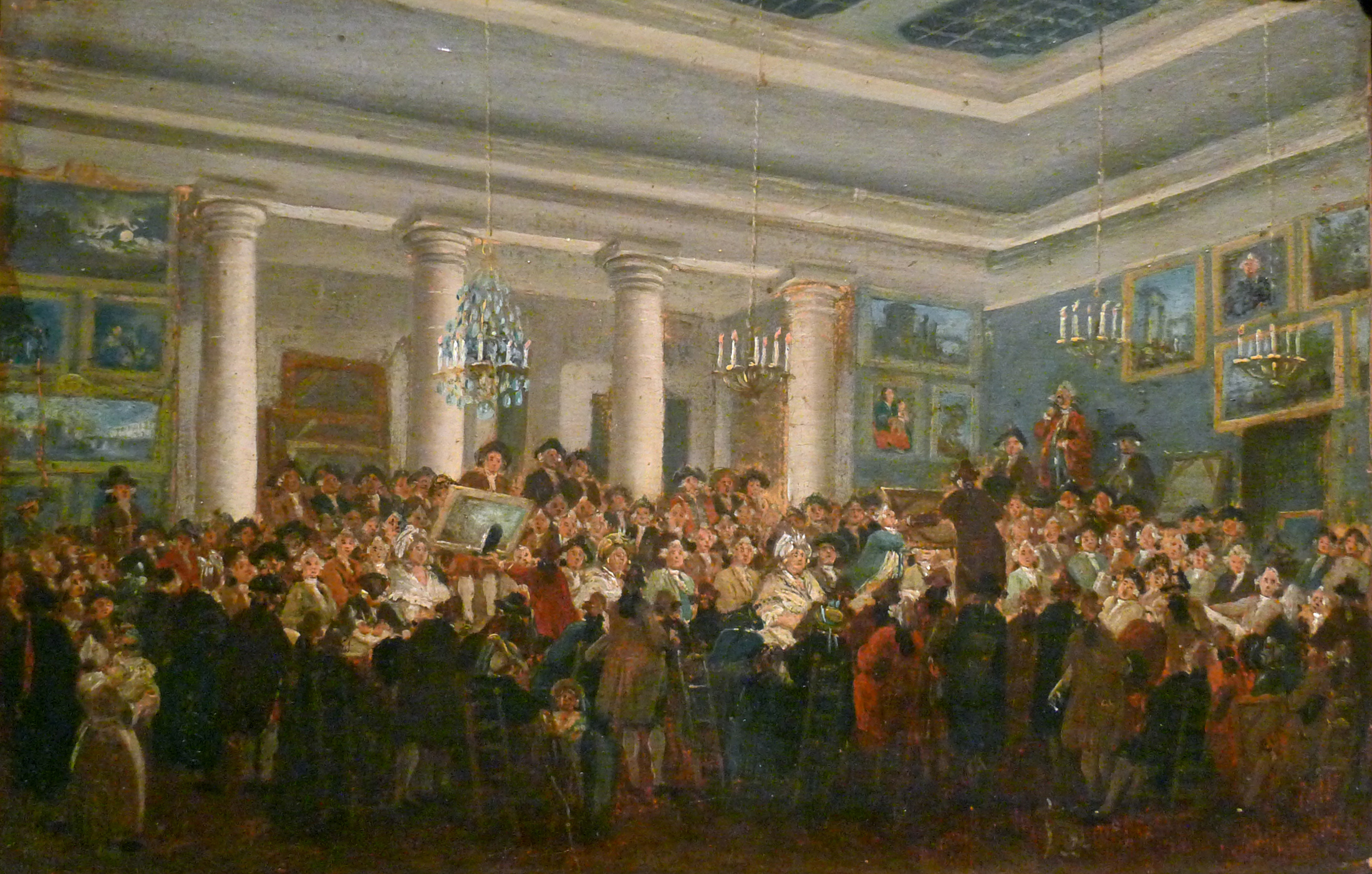 Cet hôtel , construit par Le Vau en 1630, abrita les ventes publiques de 1786 à 1830.